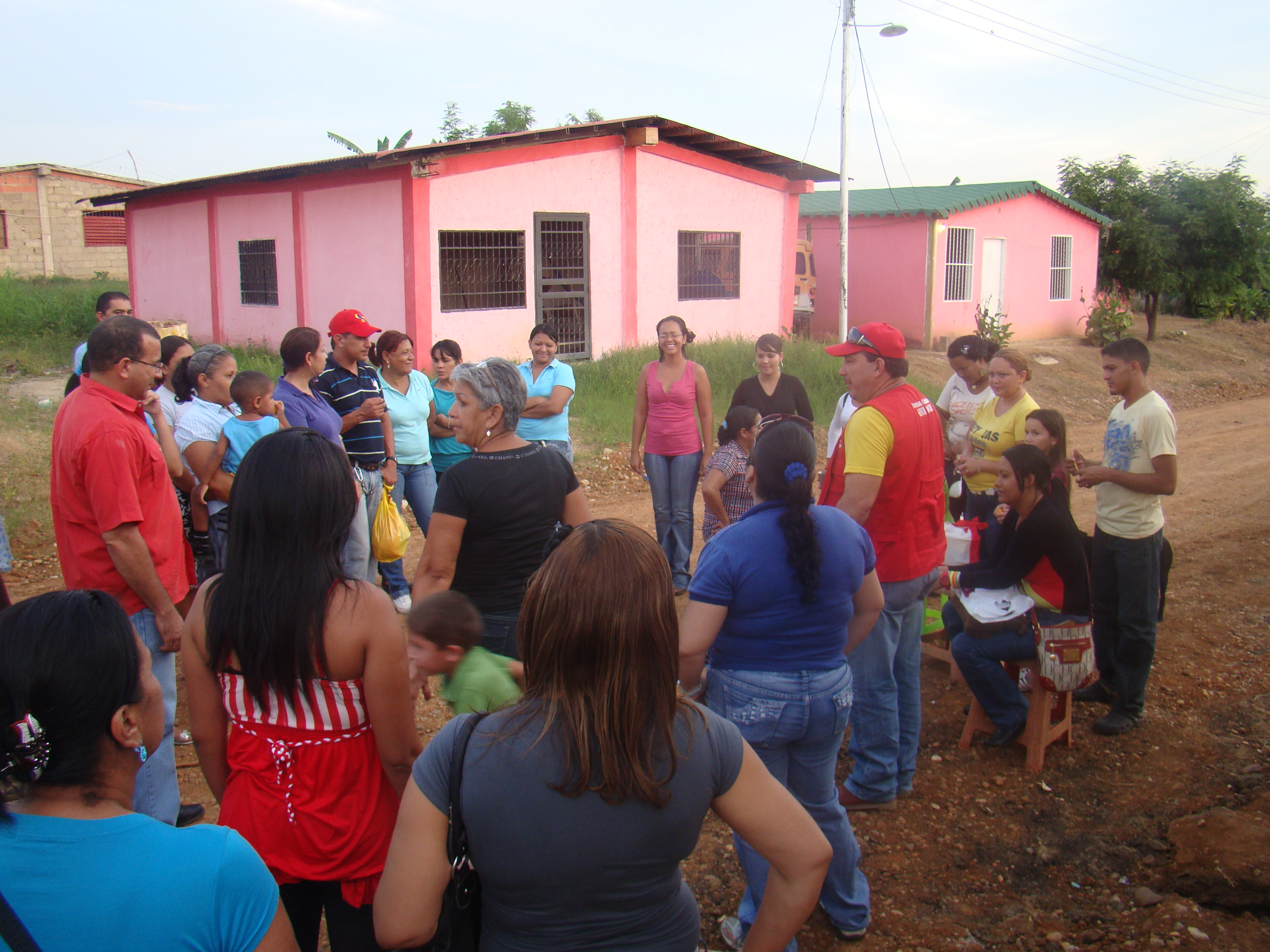 gestion social porfirio oropeza